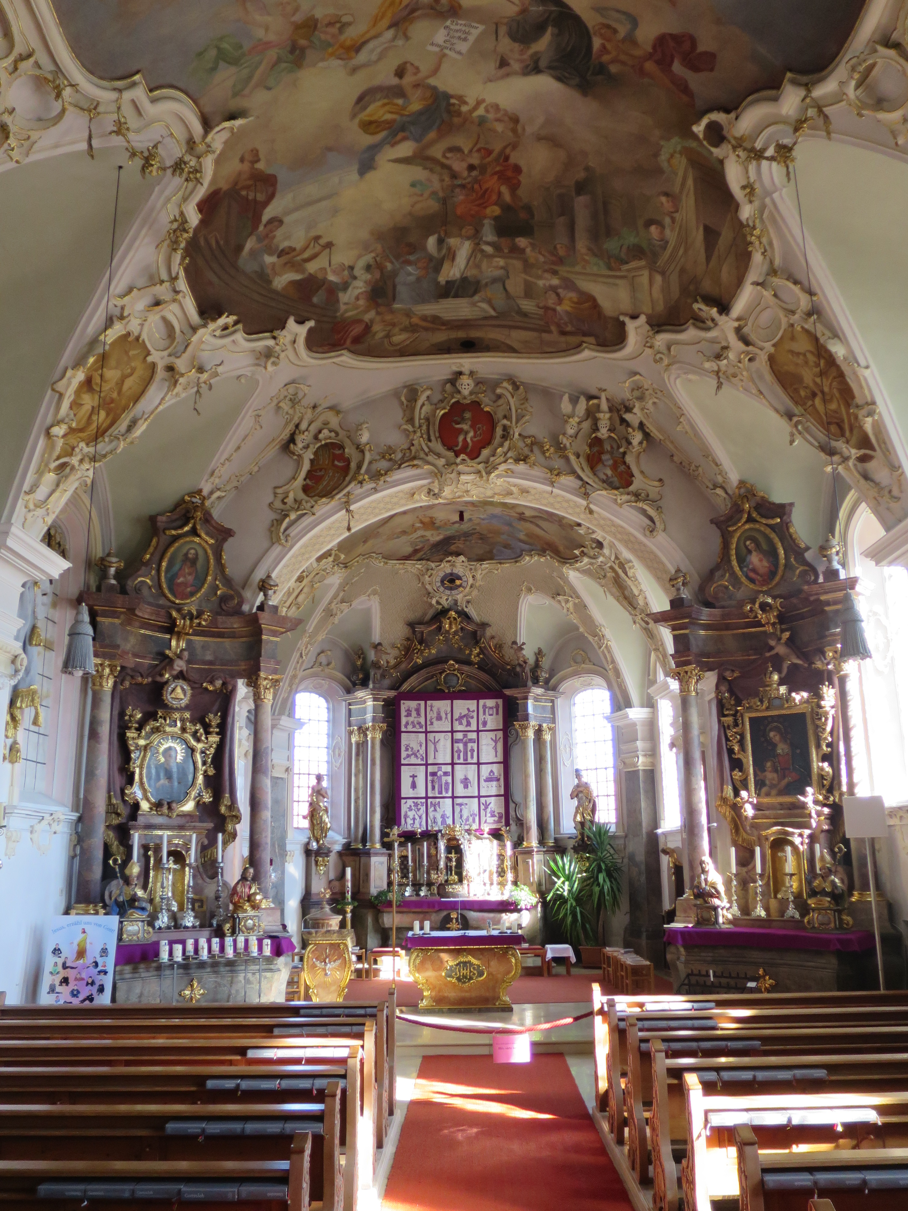 Innenraum der Kirche St. Laurentius in Haag an der Amper.